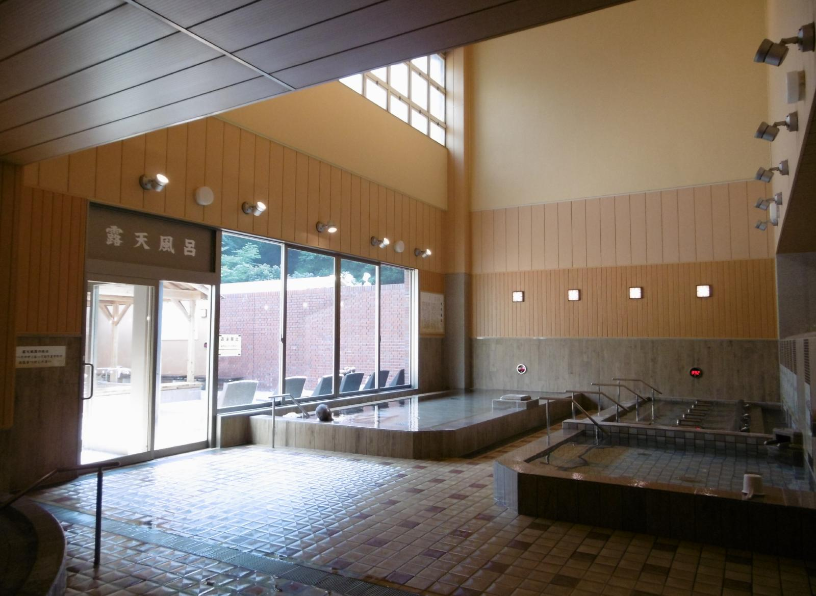 別子温泉の内風呂